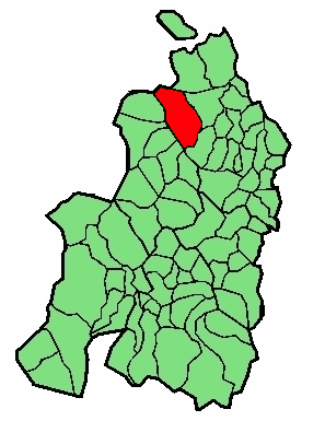 aipaturiko udalerriaren kokapena Nafarroa Beherean